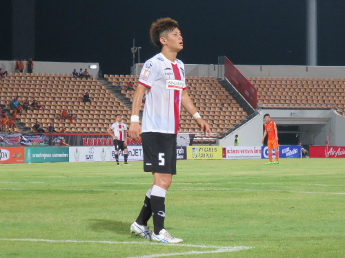 Kazuki Murakami